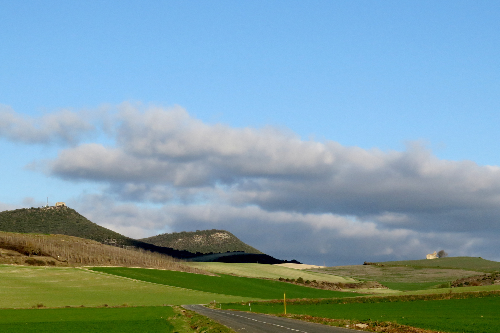 Ermita de San Formerio e Iglesia de San Clemente, en el entorno del Condado de Treviño (Burgos) y Lacervilla (Álava)